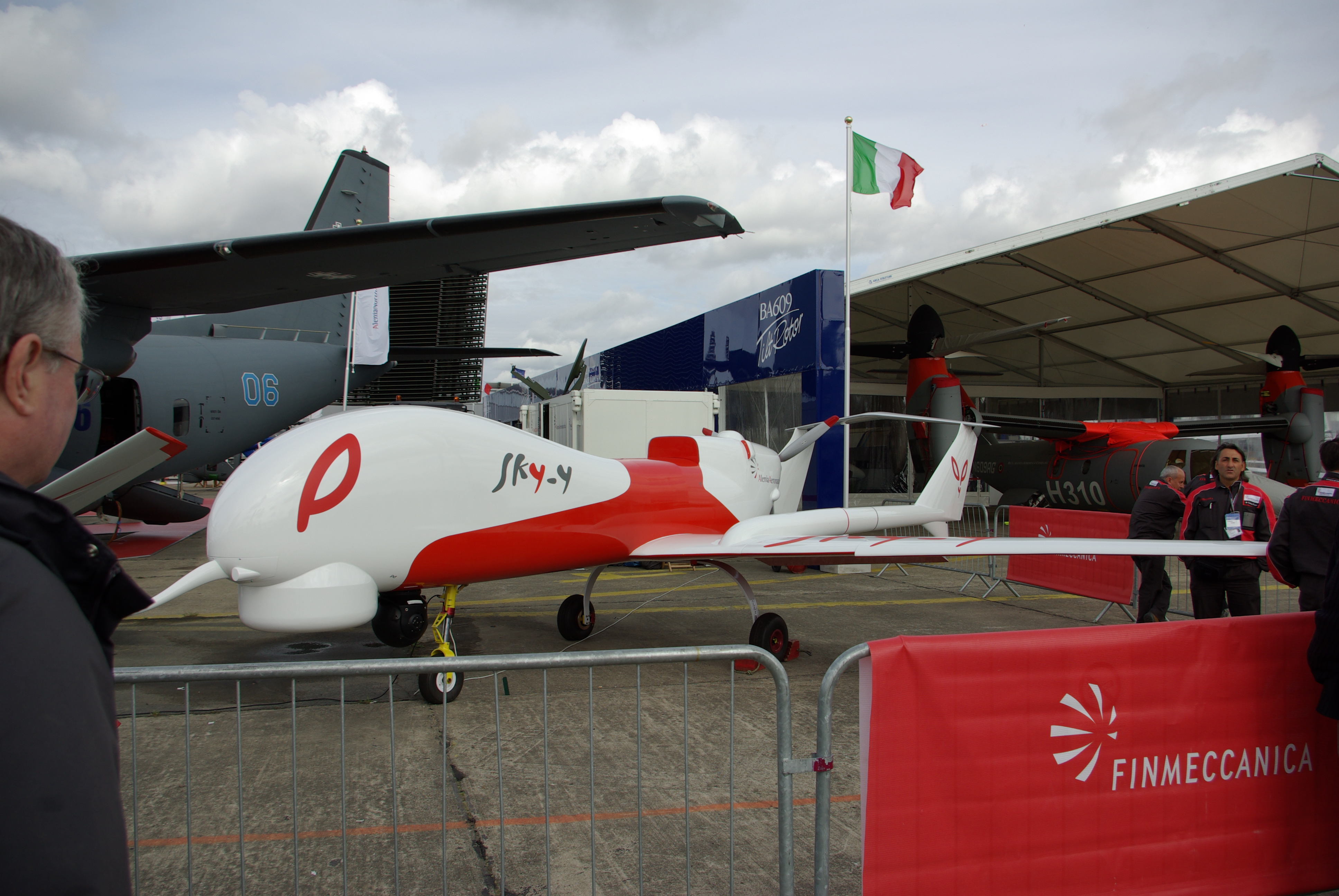 Alenia Aeronautica Sky-Y